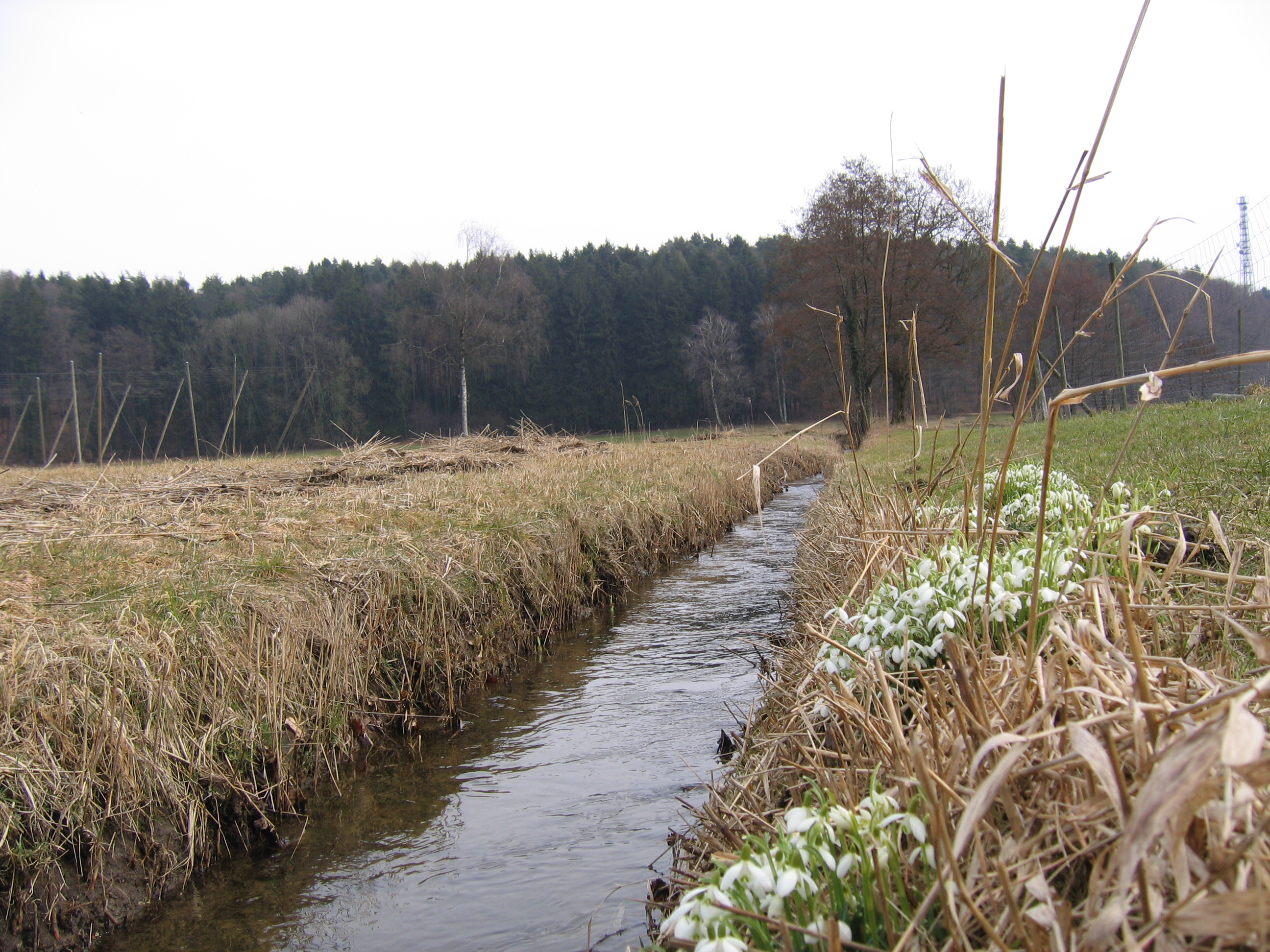 Kressbronn am Bodensee: NSG Berger Weiher; Betznauer Bach (Abfluss)